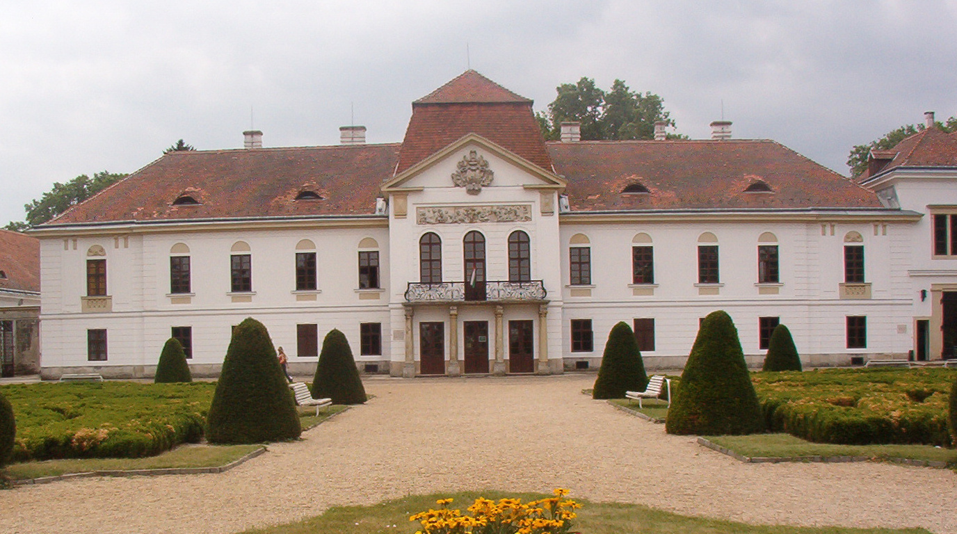 Széchenyi emlékmúzeum (Nagycenk, Kiscenki út 3.) This is a photo of a monument in Hungary, Identifier: 18191